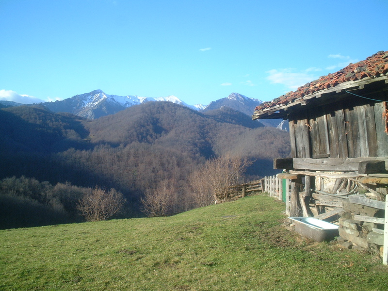 Hórreo Tradicional asturiano en el Parque natural de Redes